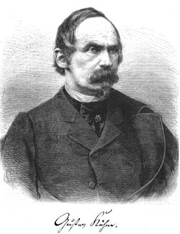 Gustav Kühne, deutscher Schriftsteller im 19. Jh.